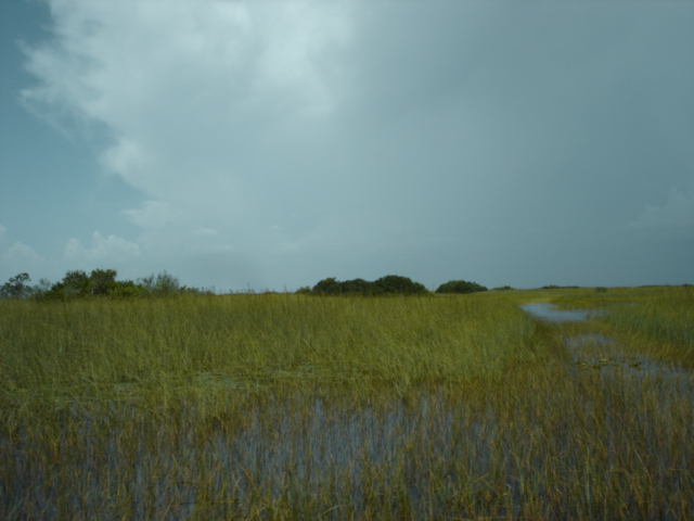 Everglades